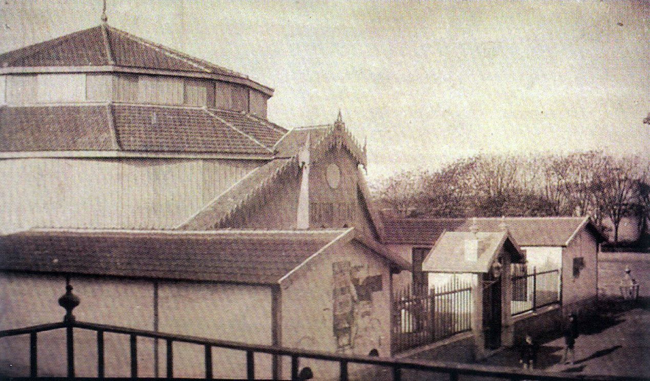 Antiguo Teatro-Circo Chapí de Villena, edificio de madera que desapareció para dejar lugar al actual Teatro Chapí.